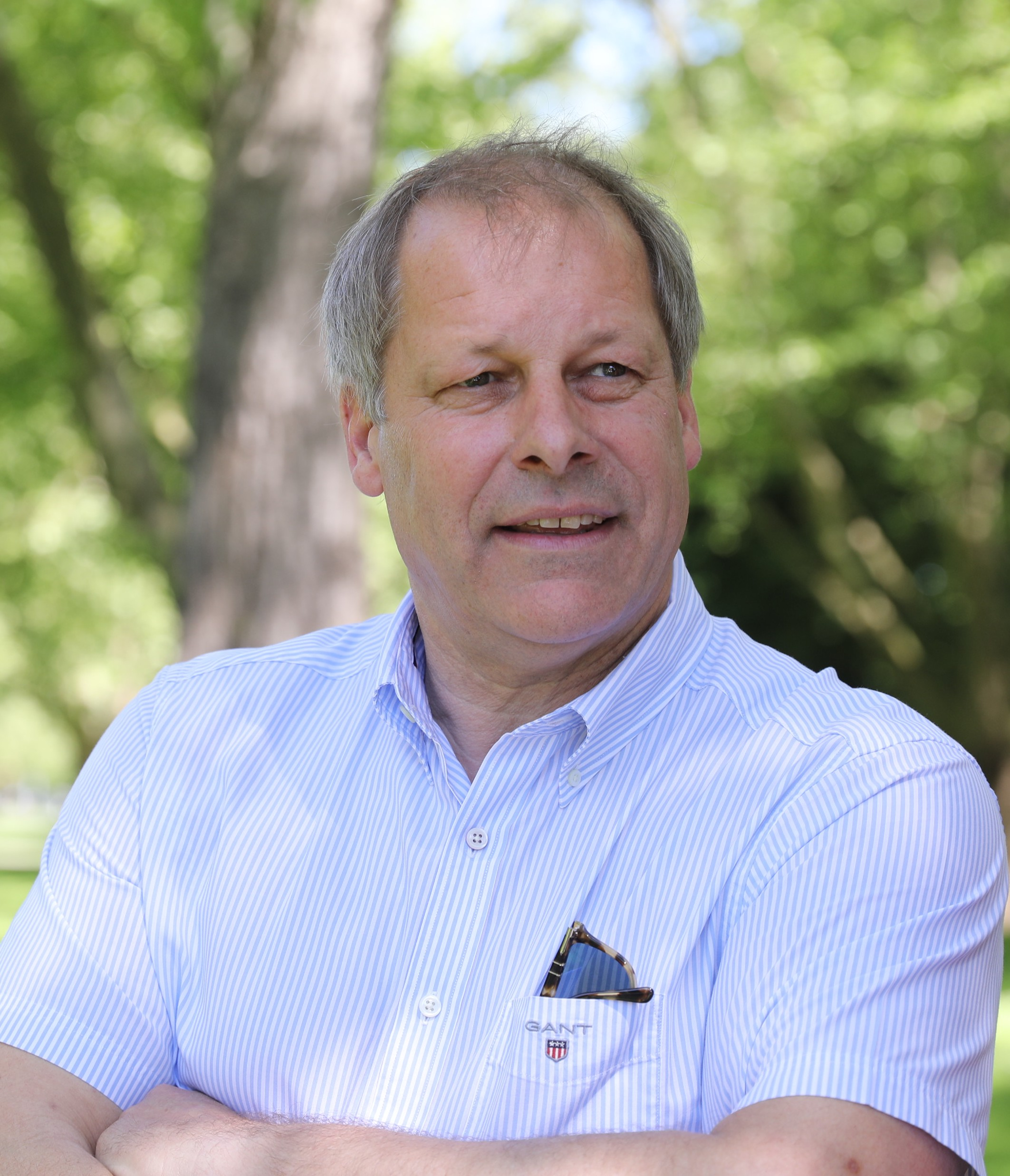 Markus Ritterbach, Vize-Präsident des 1. FC Köln